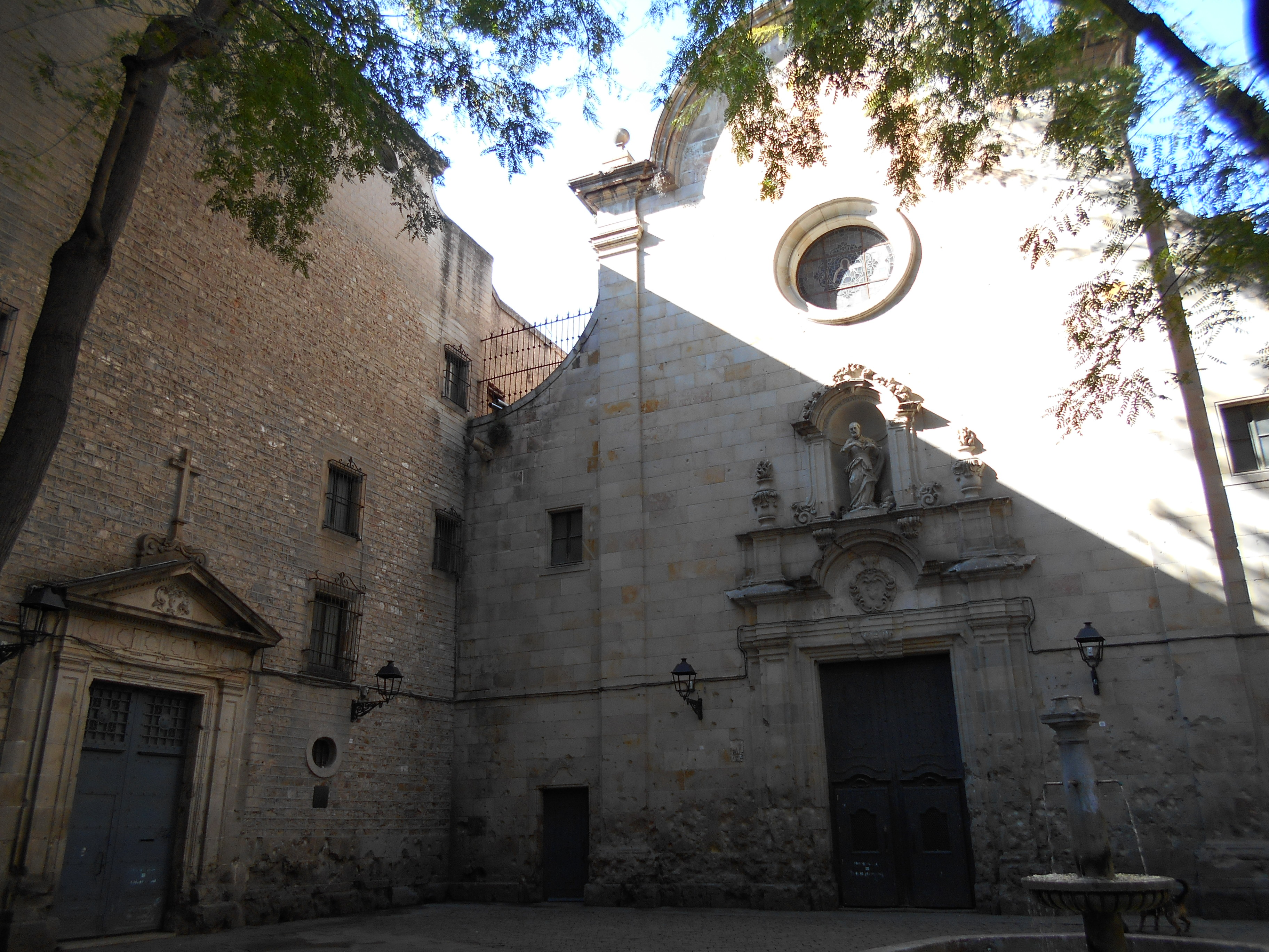 Iglesia de Sant Felipe Neri de Barcelona.